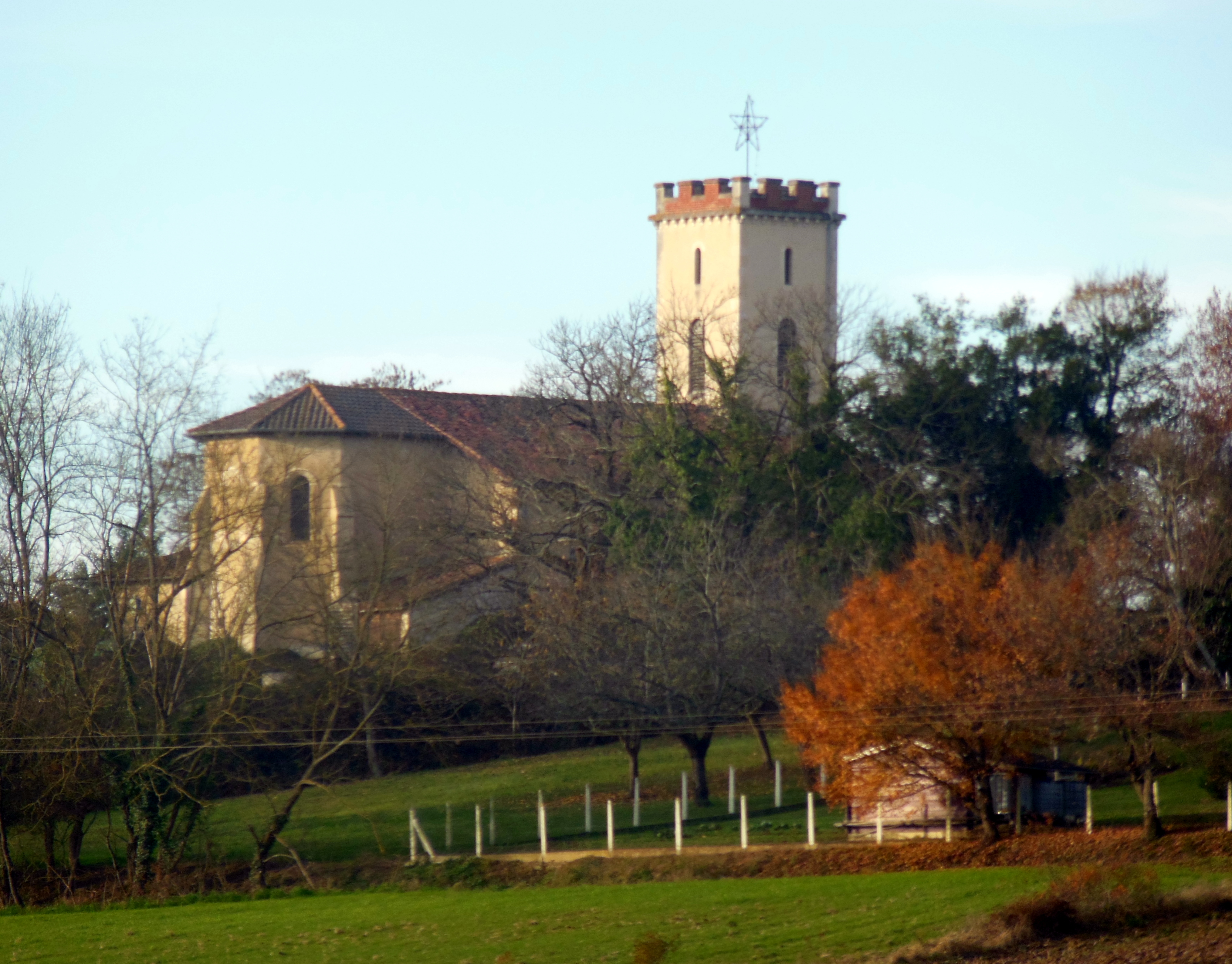 Église Saint-Pierre de Banos (Landes, FRance), vue extérieure